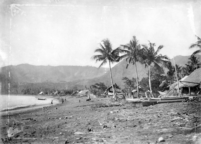 Negatief. Deze foto is gemaakt tijdens de Siboga Expeditie van 1899-1900.. Een dorp langs het strand van de Ipi-baai